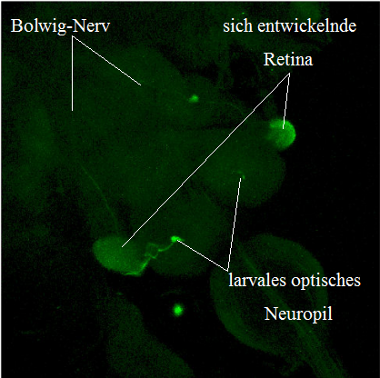 Das larvale optische System. Gehirn einer L3-Drosophila-Larve des Genotyps gmrGAL4xUAS-10xmyr-GFP durch Maximalprojektion einer konfokalmikroskopischen Aufnahme.